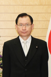 浜田昌良（復興副大臣）